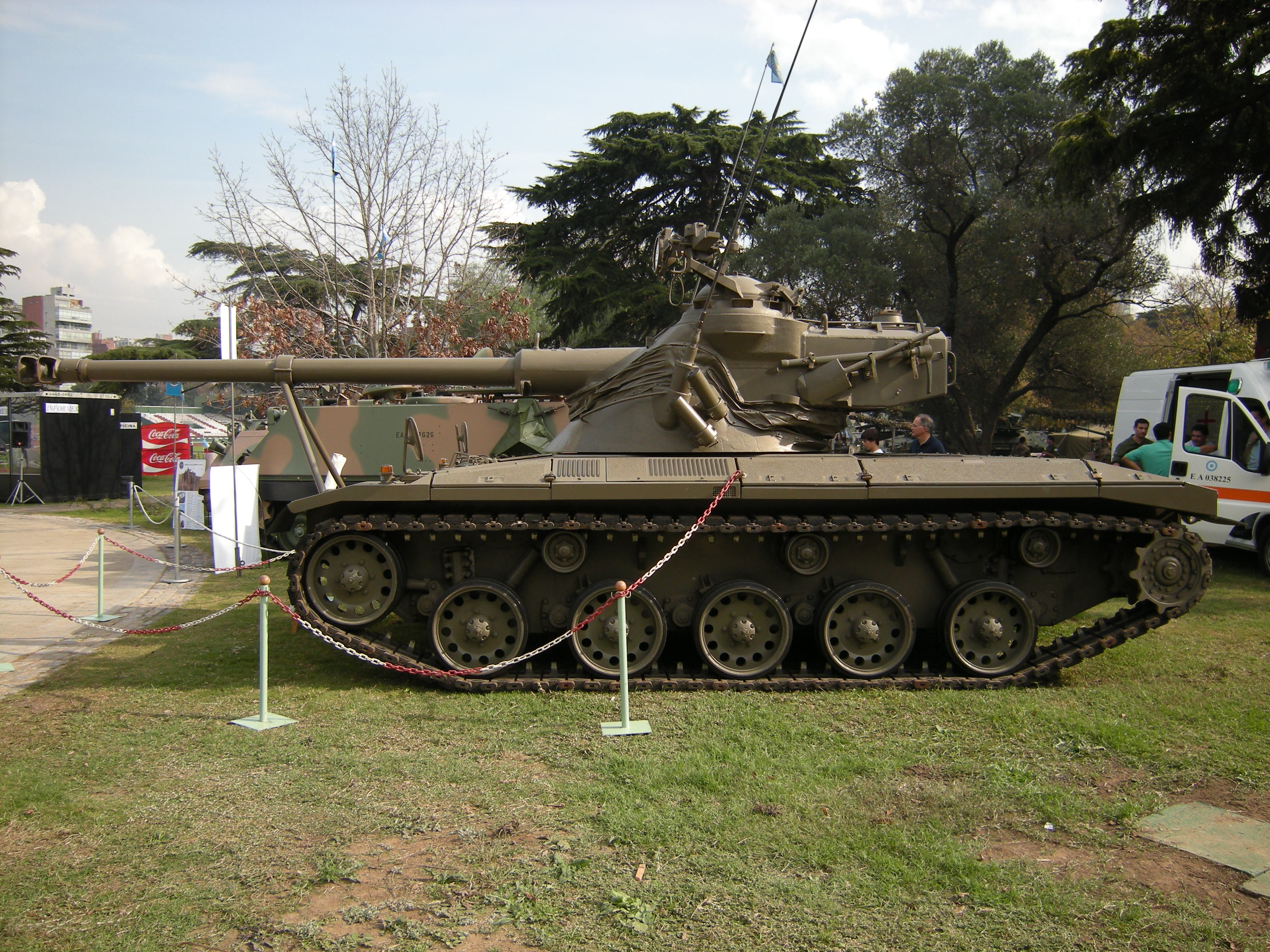 VC Tan Patagón de perfil, durante la Exposición del Ejército Argentino realizada en mayo de 2008